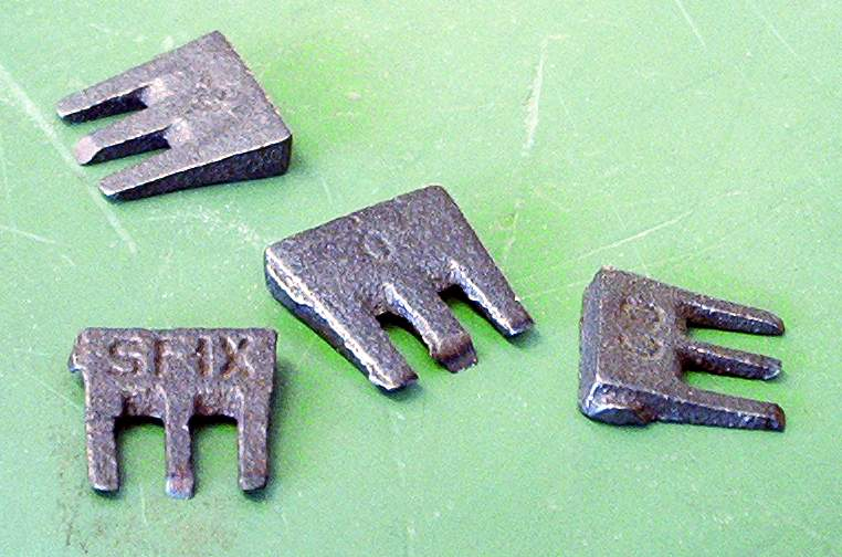 zelf gemaakte foto voor het publiek domein. Martink.